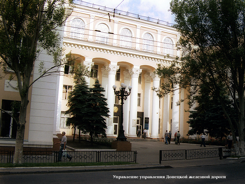 Фотография с диска Анастасии Федоренко «Донецк. Увидеть и полюбить».